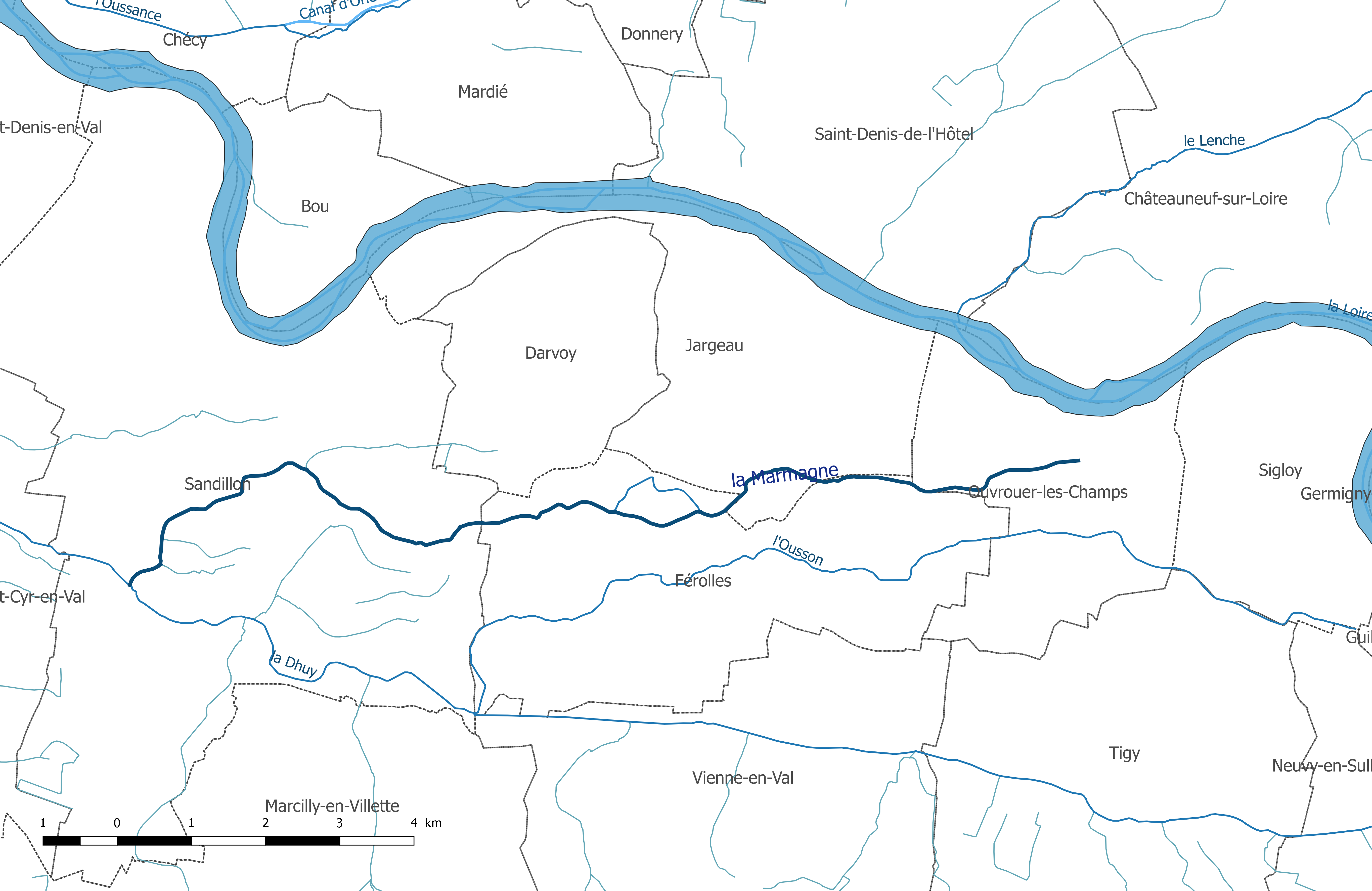 Carte du cours d'eau "la Marmagne" et de ses affluents, dans le département du Loiret.